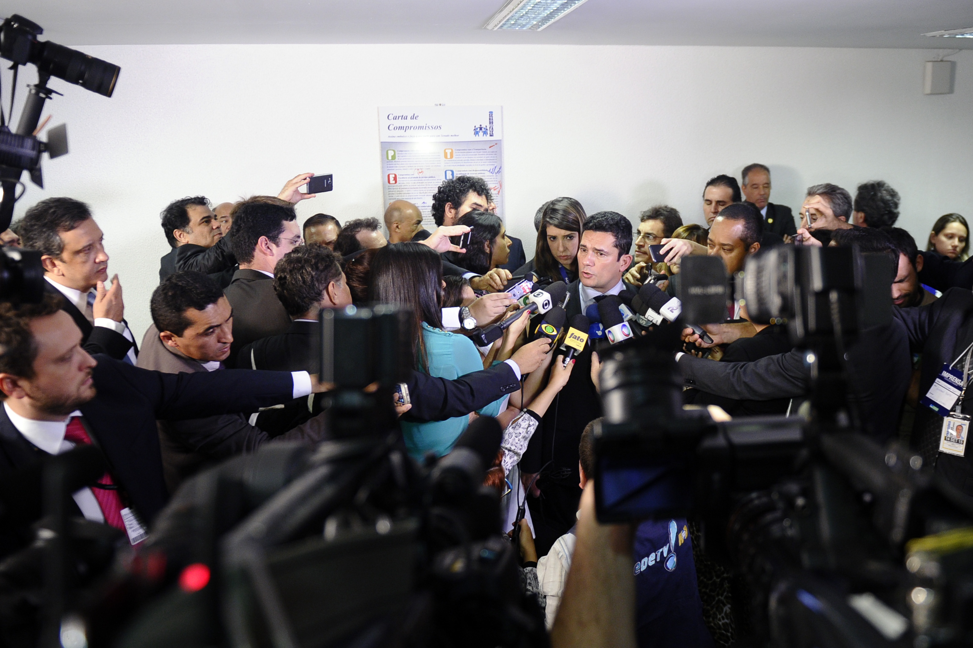 O juiz federal Sérgio Fernando Moro concede entrevista. Foto: Marcos Oliveira/Agência Senado.